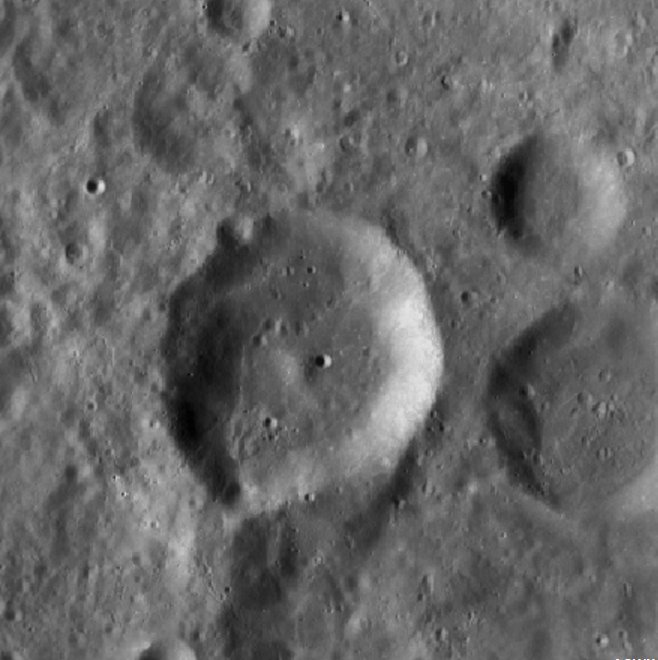 Cráter lunar Ctesibius (LRO)